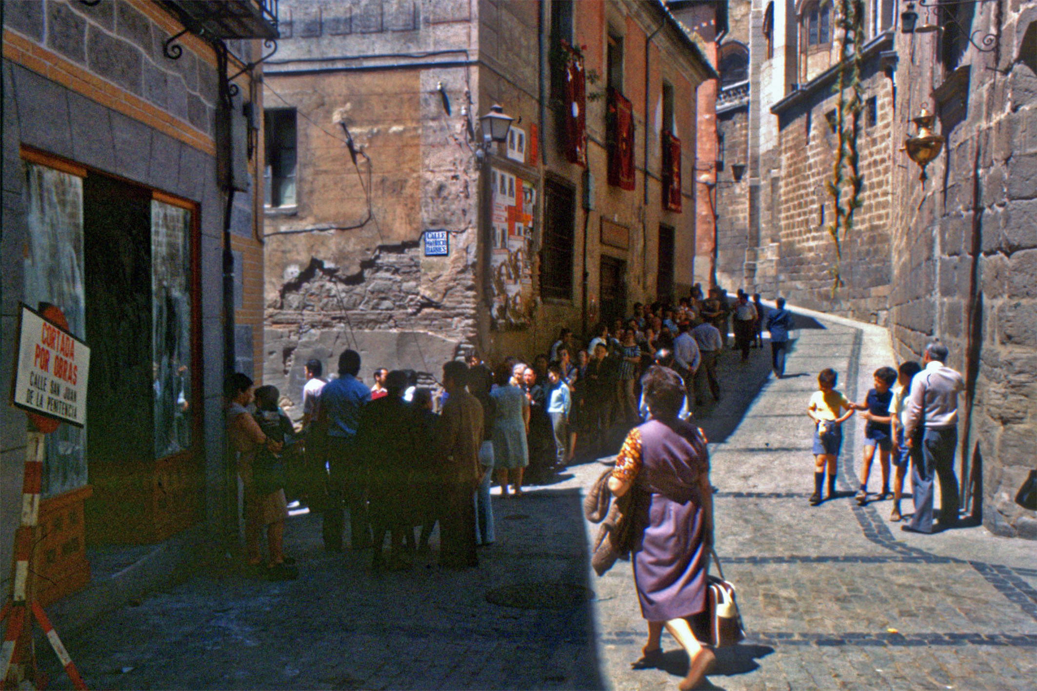 Toledo España - Elecciones Generales 15 de junio de 1977